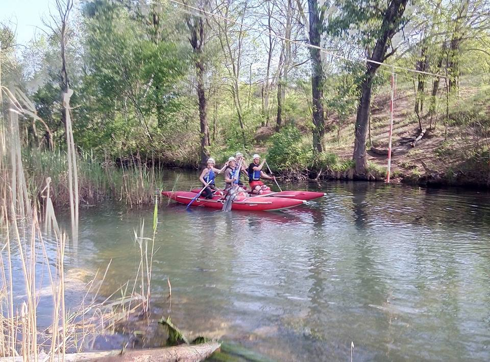 Кам'янське. Всеукраїнська дитячо-юнацька військово-патріотична гра «Сокіл» («Джура»). Міський етап. Сплав на катамаранах